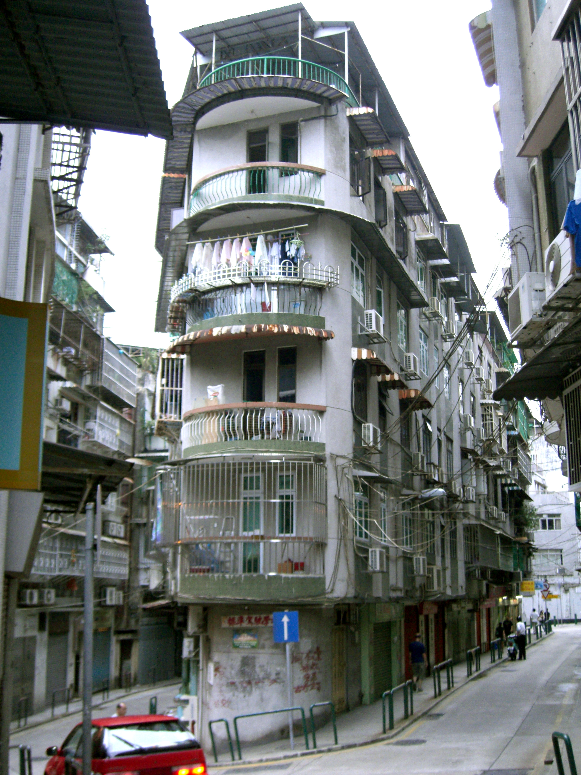 Edf. Hung Tak